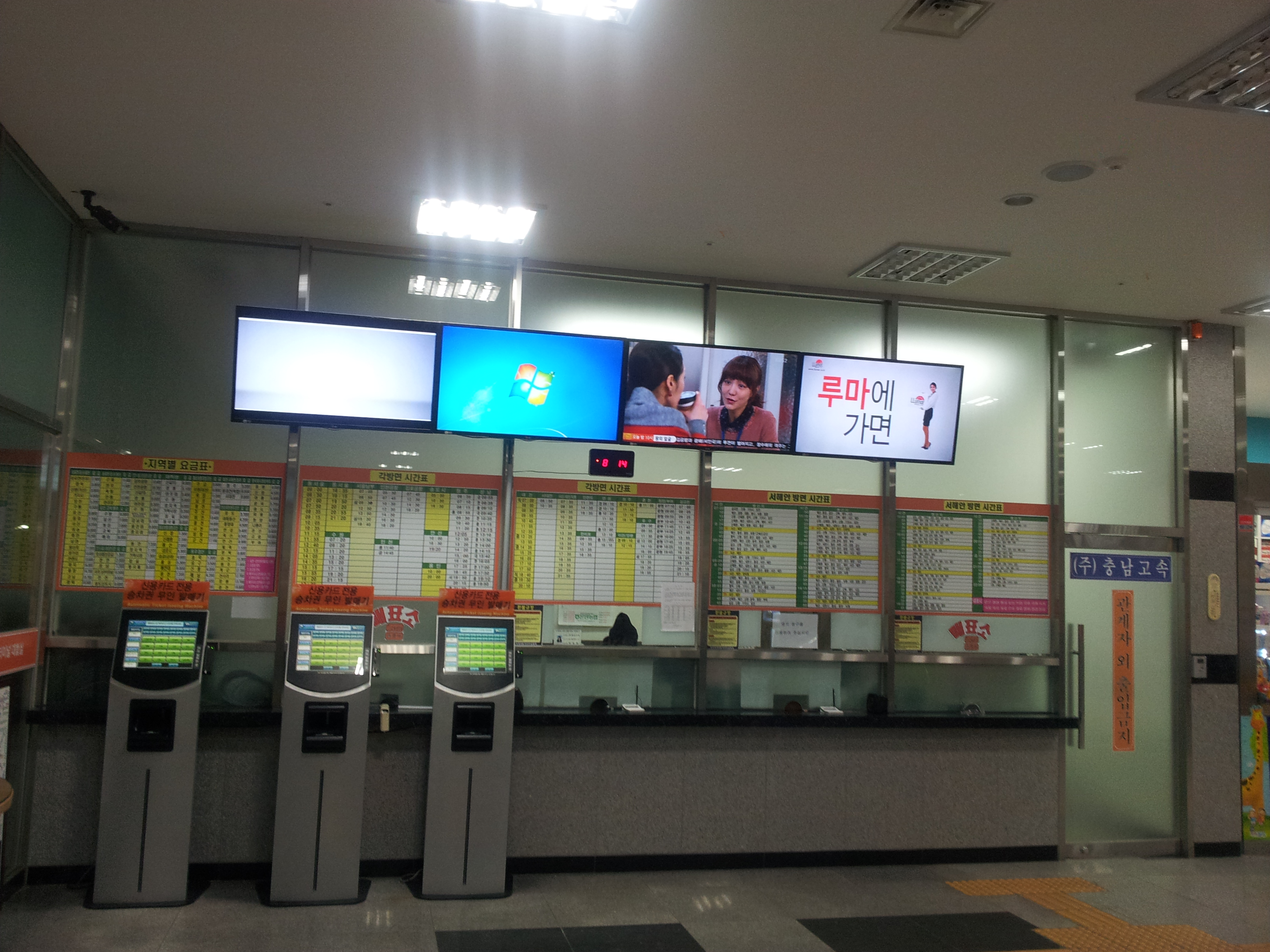 아산시외버스터미널 내부 모습